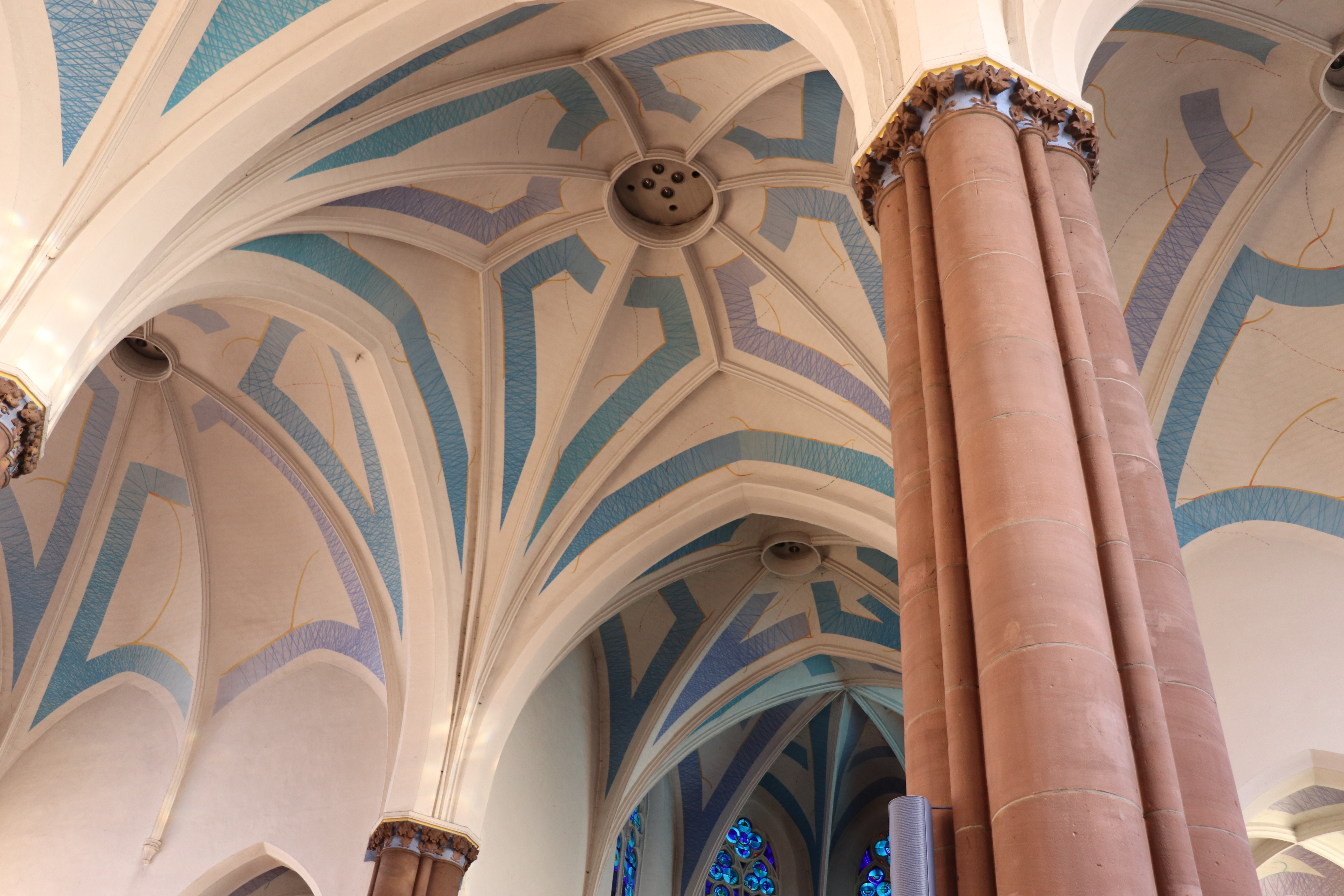 Blick zur Decke von St.Lucia.